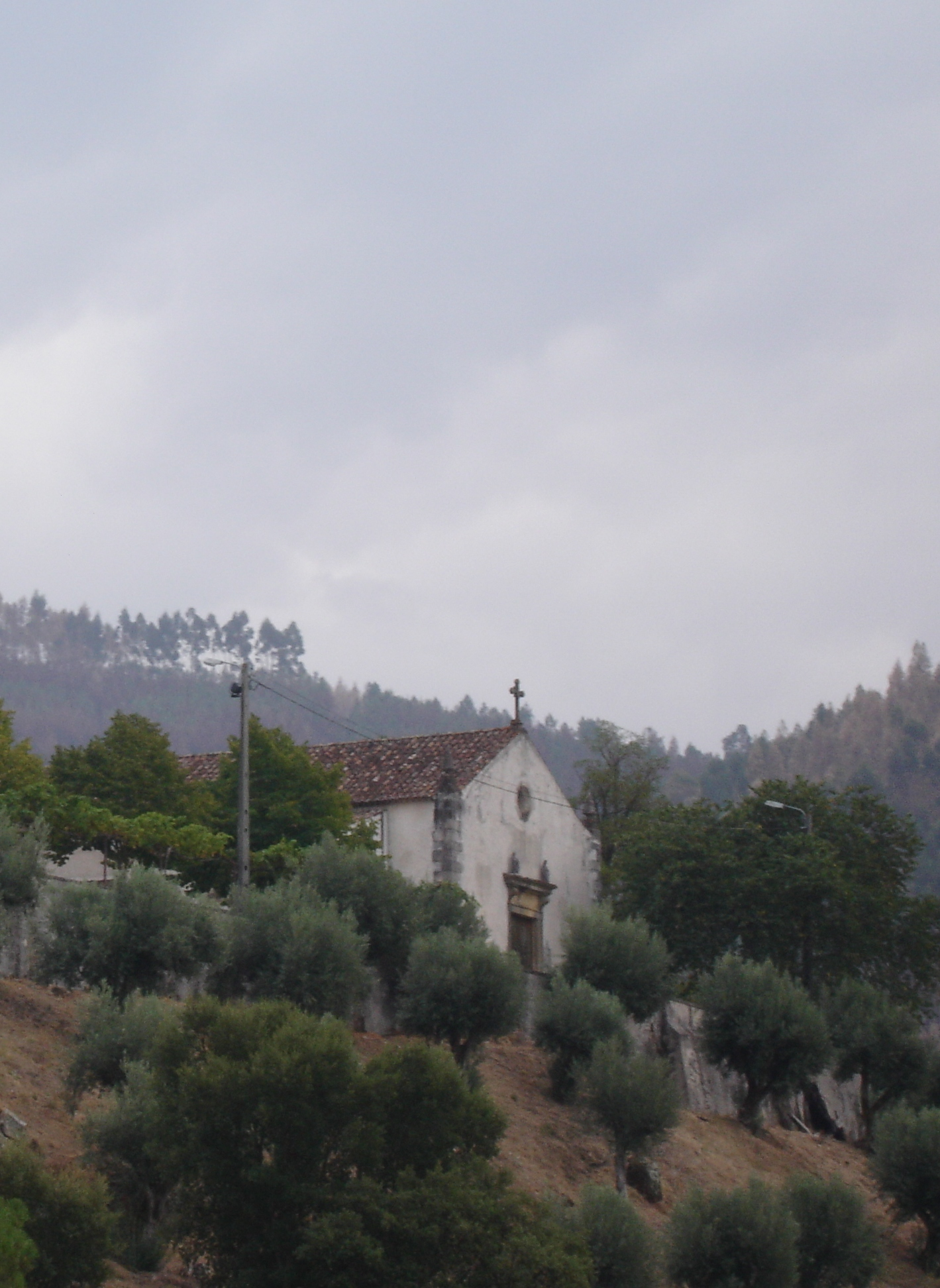 Dornes This file was uploaded for Wiki Loves Monuments in Portugal with the unique identifier 73795.